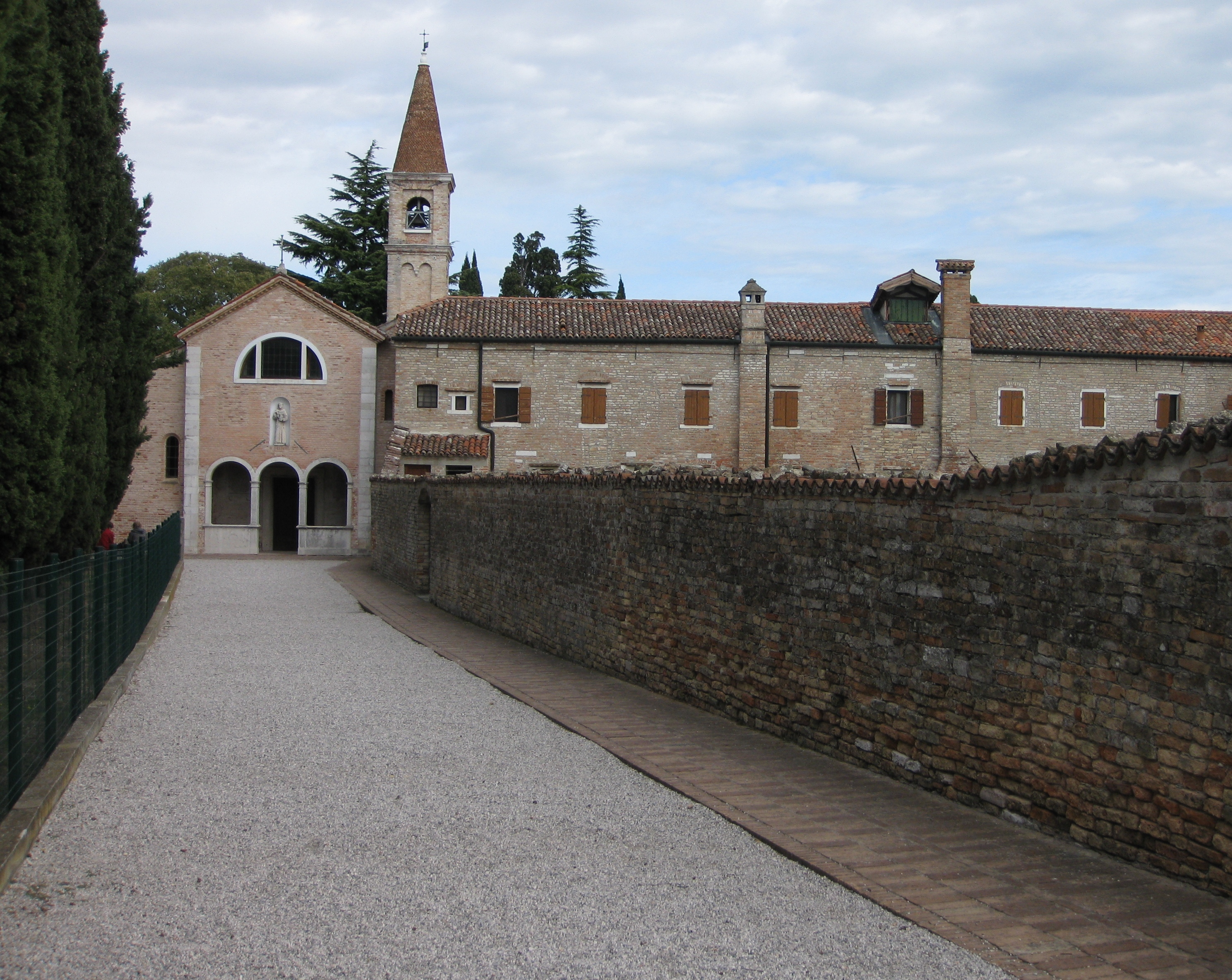 San Francesco del Deserto a Venezia.